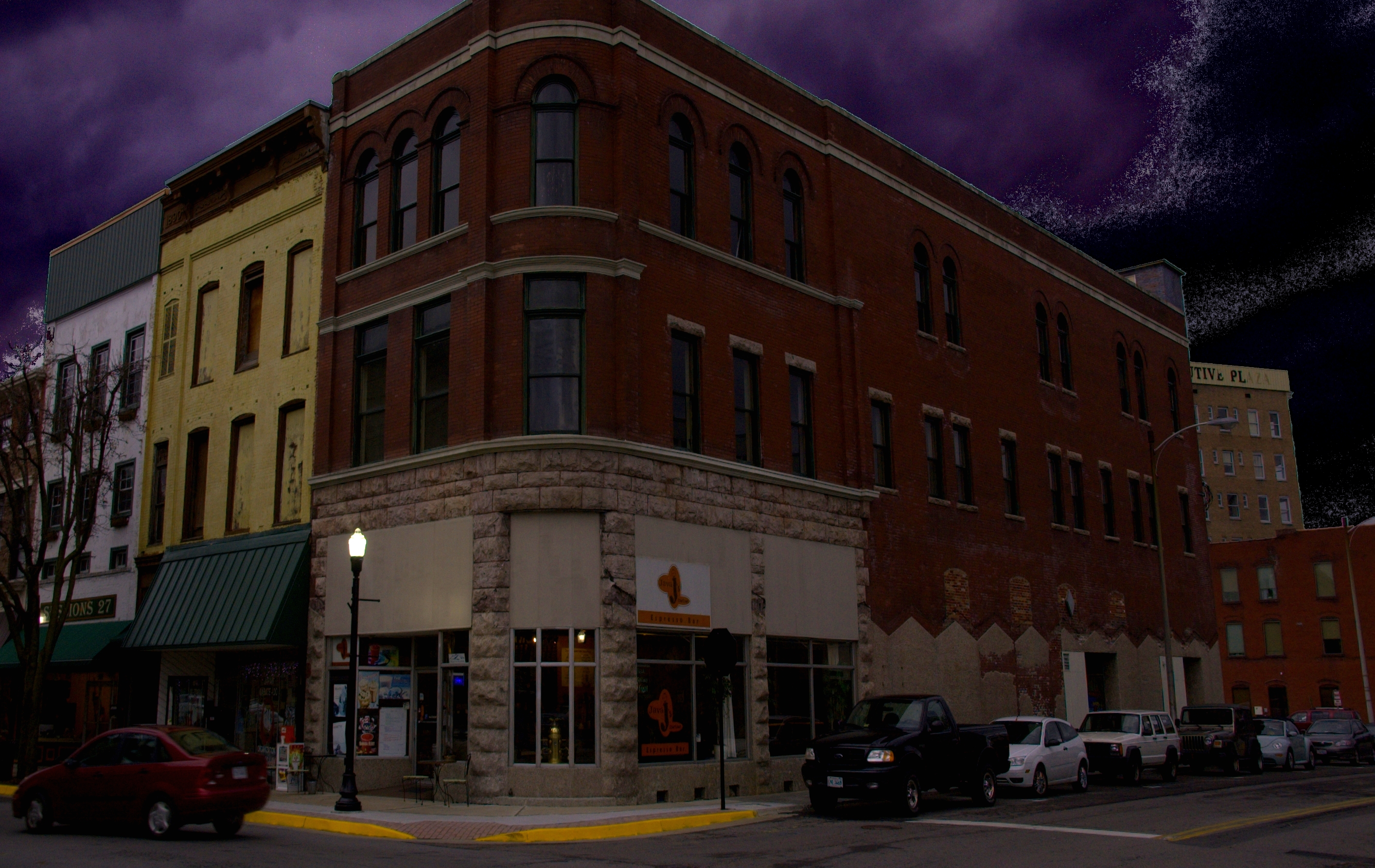 2012-02-08; Susong Building, Bristol, Virginia